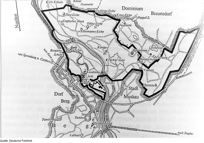 Original image description from the Deutsche Fotothek Bad Muskau. Plan des Muskauer Parks, 1938, aus: Graf von Arnim/Boelke 1979